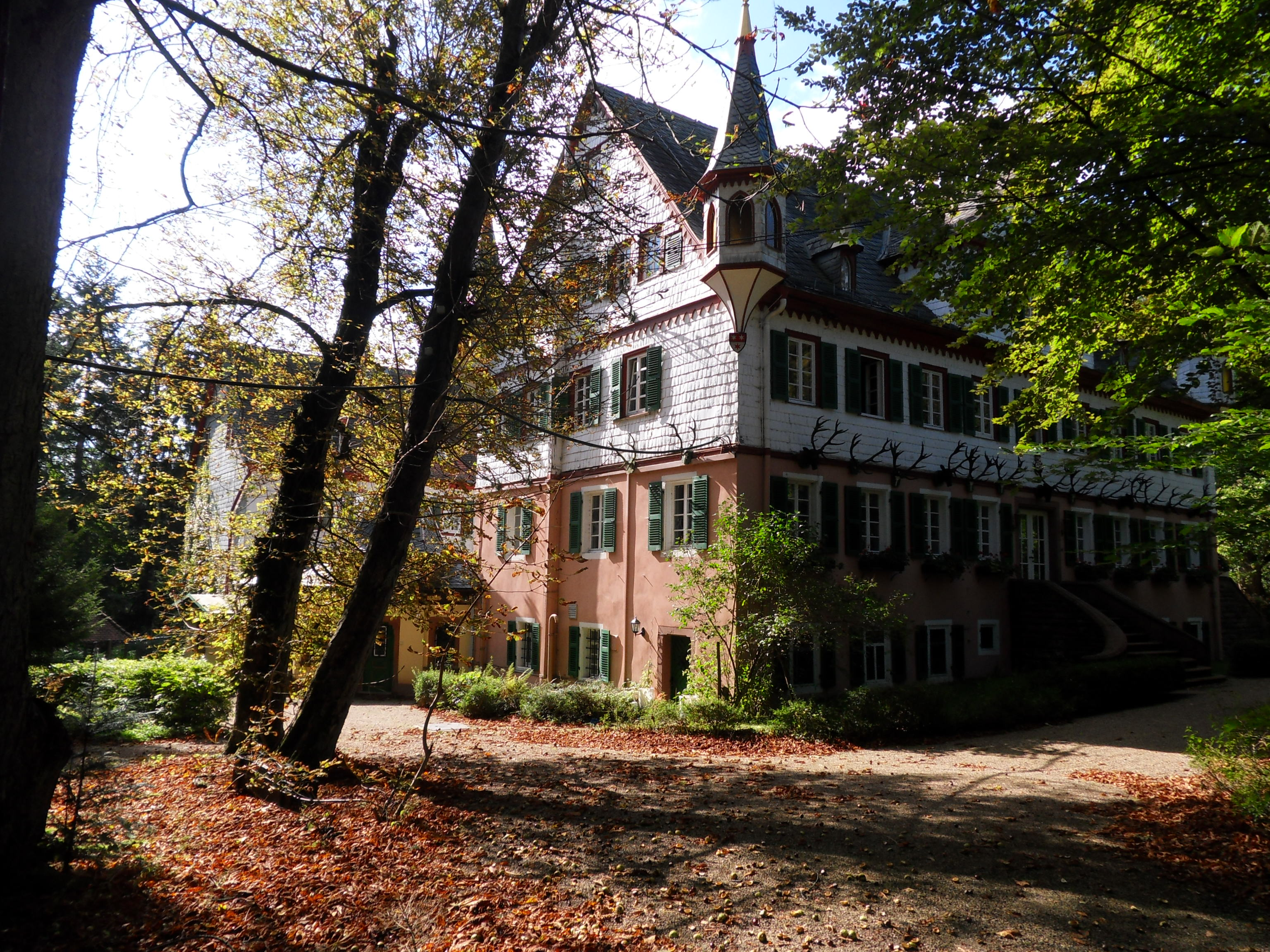 Blick von der Bundesstraße 47, der Nibelungenstraße, auf Jagdschloss Eulbach in der Gemarkung Würzberg der Stadt Michelstadt im Odenwald.